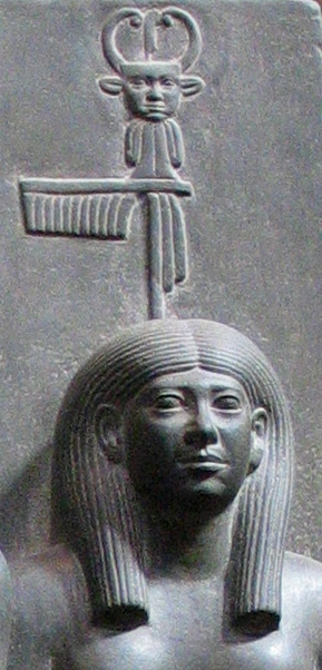 Göttin Bat